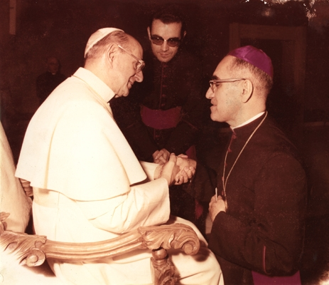 Monseñor Romero junto al papa Pablo VI. Aproximadamente un seis semanas antes de la muerte del pontífice.